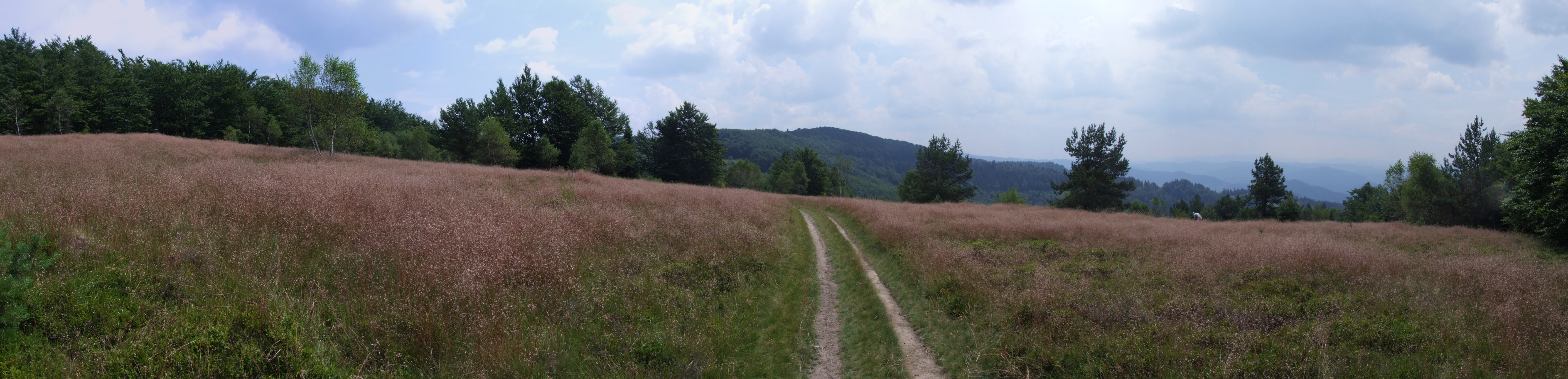 Hala Jaworzyna w Beskidzie Sądeckim (Pasmo Jaworzyny Krynickiej) i widok na grzbiet Pisana Hala - Groń - Granica